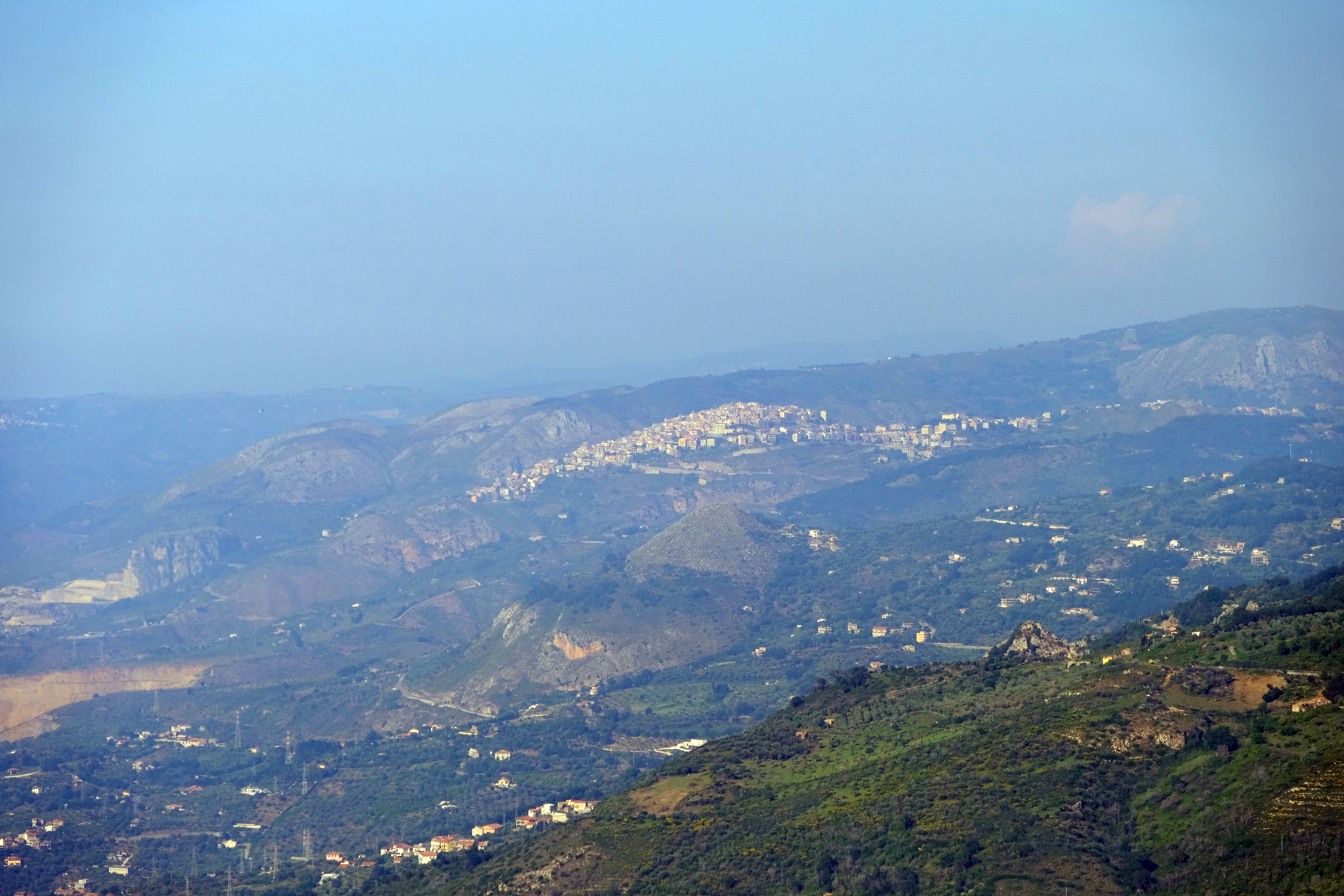 Militello Rosmarino da San Fratello